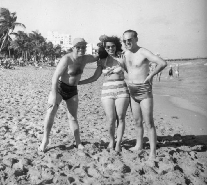 מימין לשמאל: משה וילנסקי, שושנה דמארי ויוסף גולנד בארצות הברית בעת מסע ההופעות המשותף